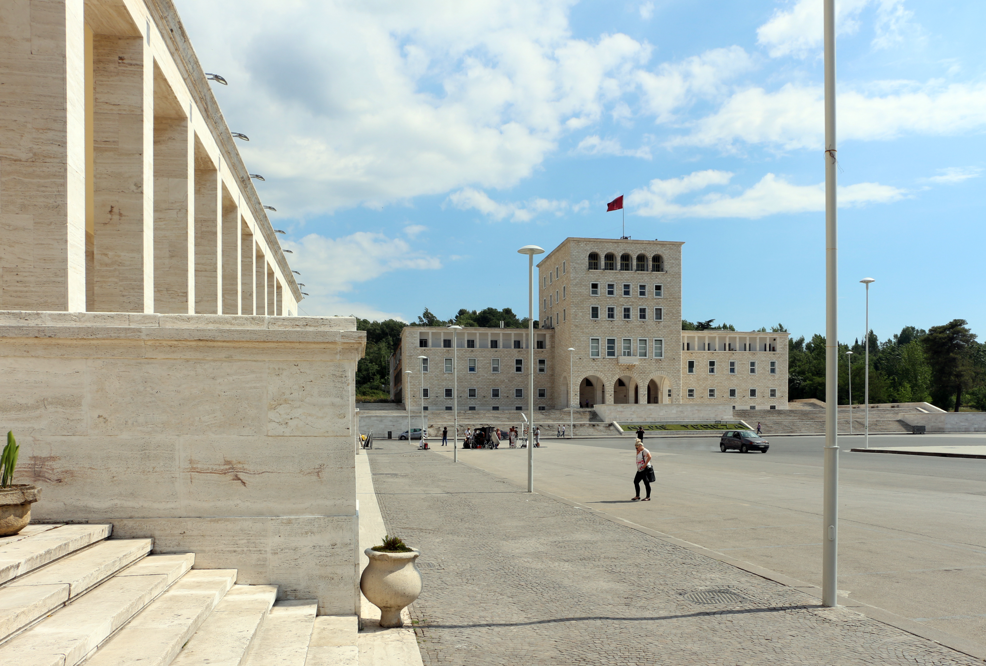 Universiteti I Tiranes